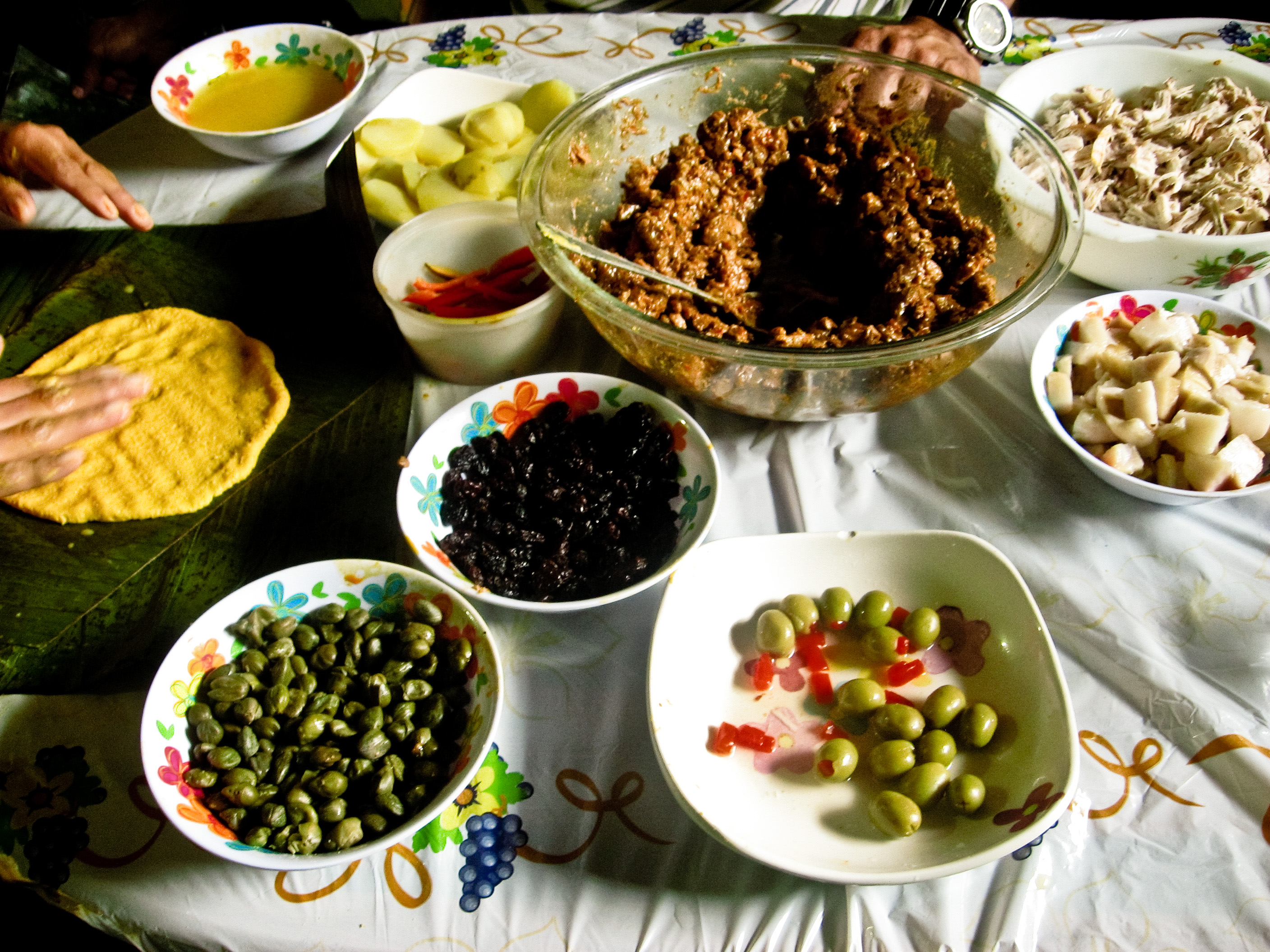 Ingredientes de la Hallaca Venezolana, plato típico navideño